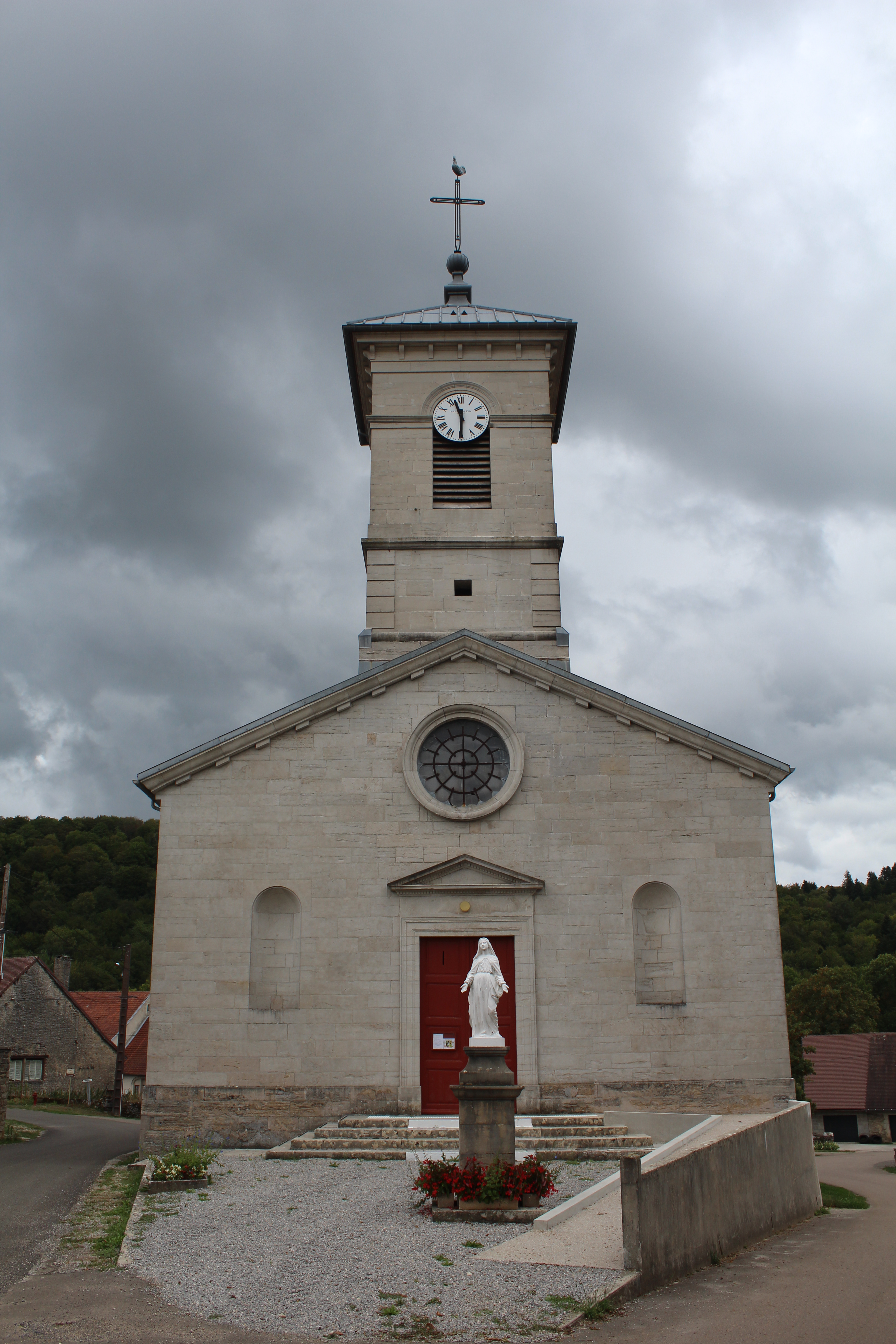 Église Saint-Michel de Verges, Jura.